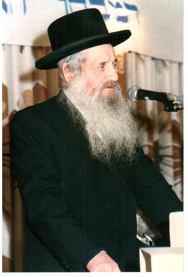 המבחן נערך בשנת תשמח באולמי ווגשל